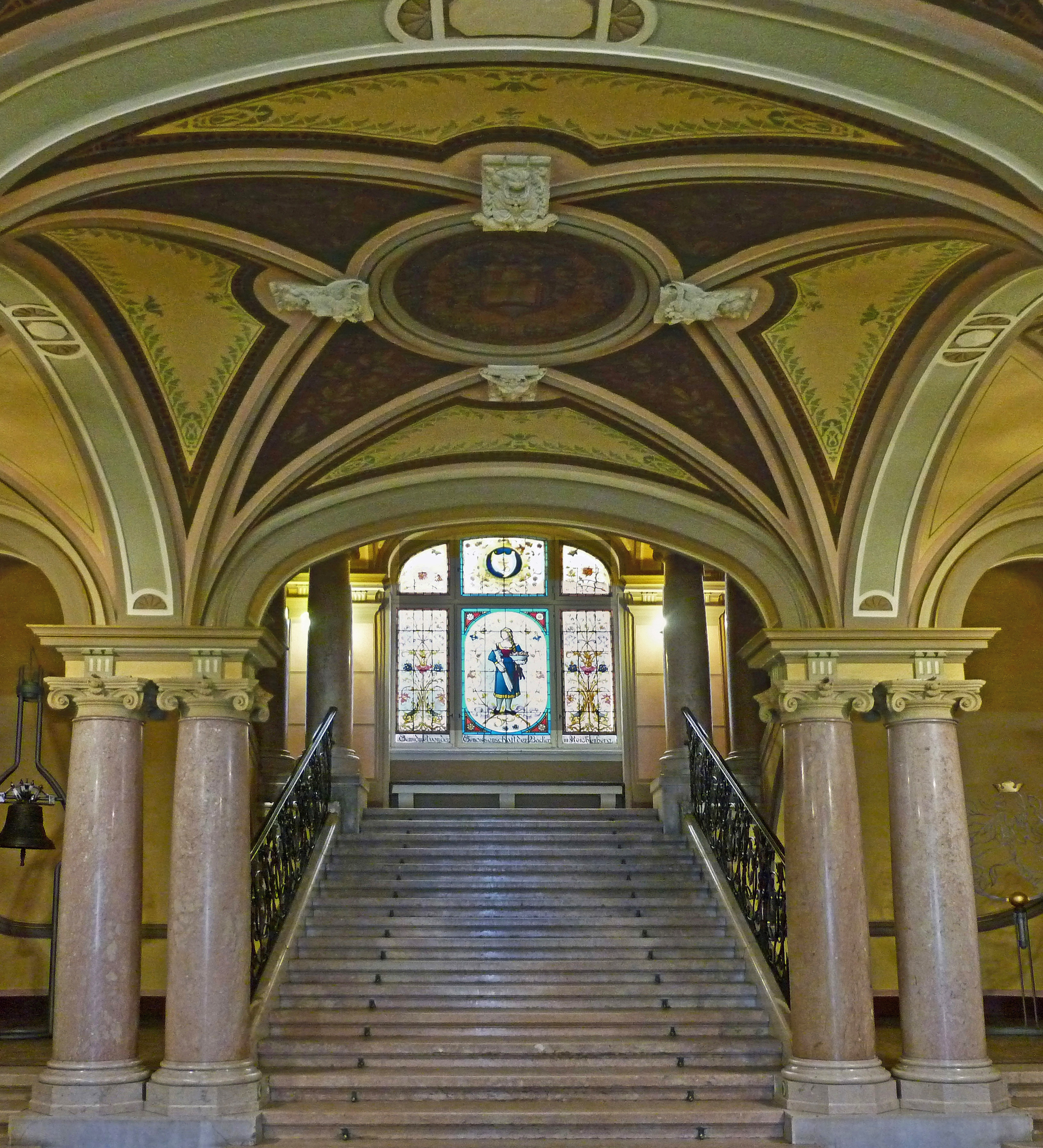 Liberec (Reichenberg) – Rathaus, Eingangshalle mit Marmortreppe, Säulen und dem Glasfenster der Bäckerinnung.